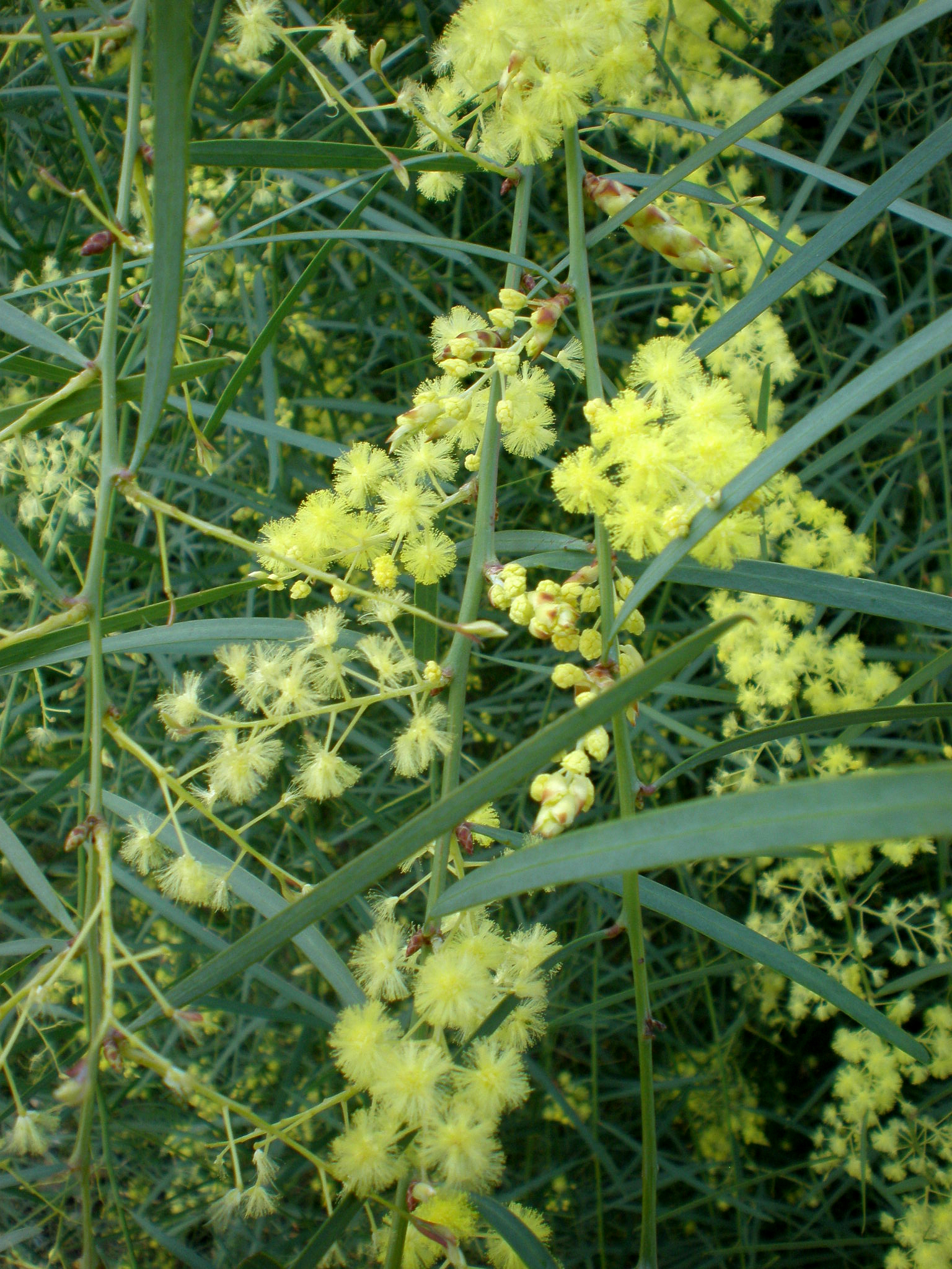 Jardín Botánico de Barcelona.